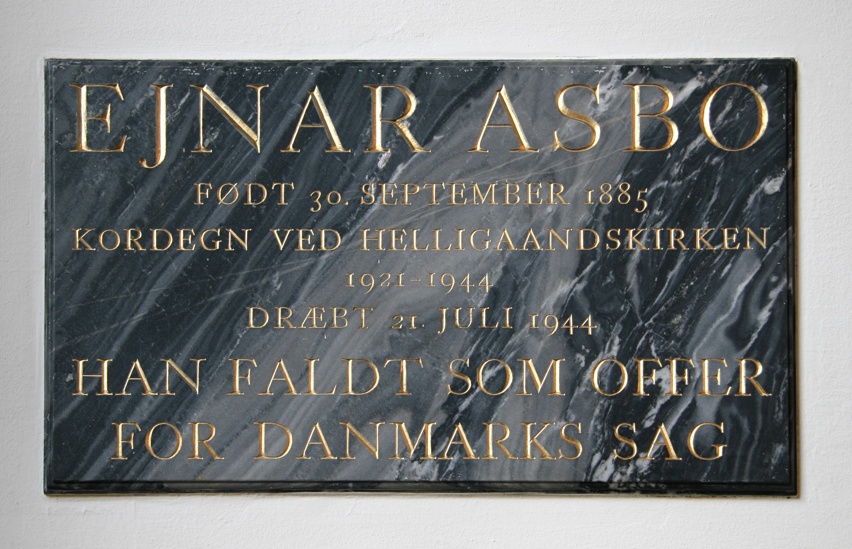 Helligåndskirken, Copenhagen, Denmark. Memorial Einar Asbo. 1944.